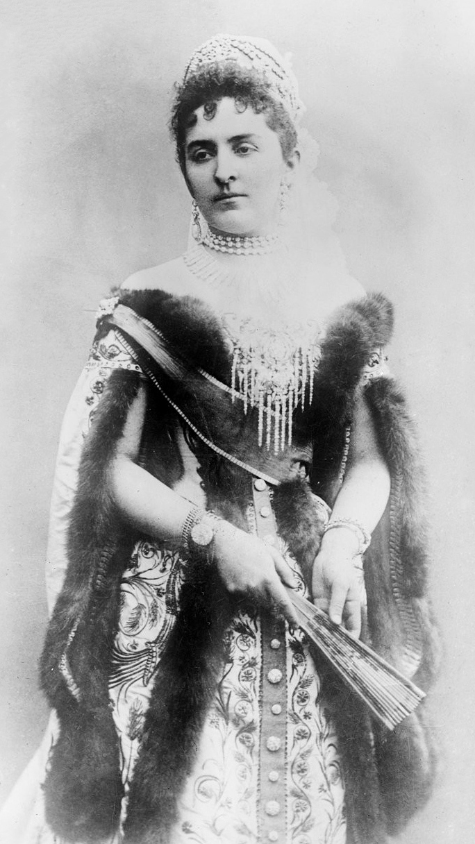 La Grande Duchesse Nicolaïevitch, femme du Grand Duc Nicolas : [photographie de presse] / [Agence Rol]